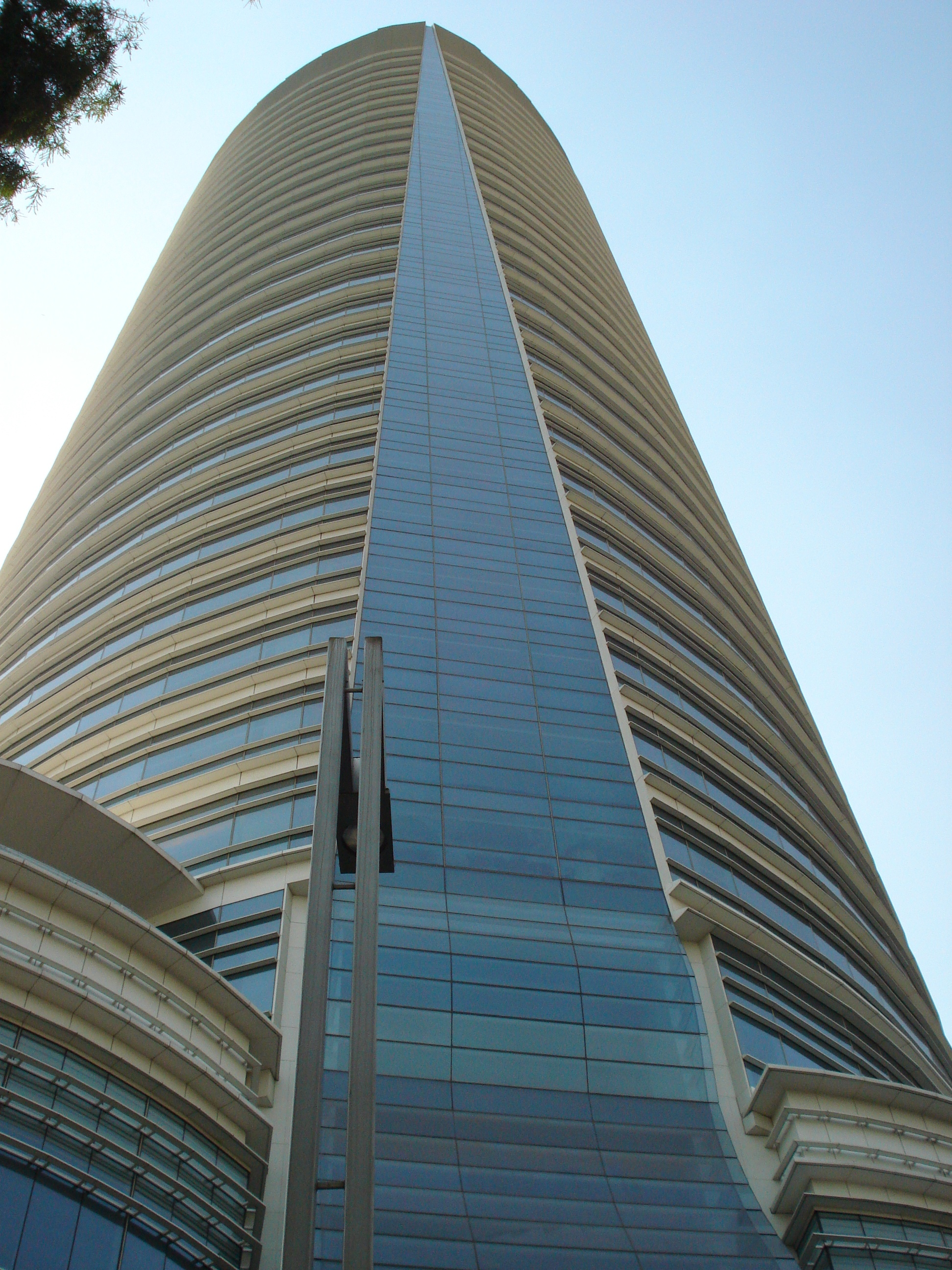 Torre Libertad sede del Hotel St. Regis Hotel & Residences, en la Ciudad de México